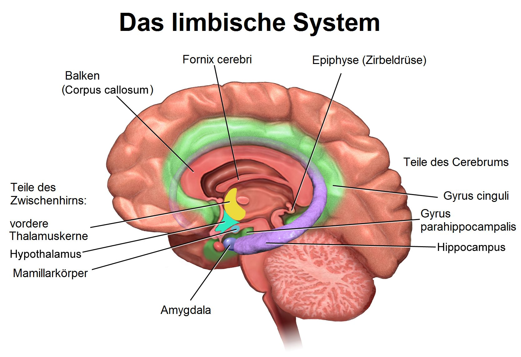 Gehirn: Limbisches System